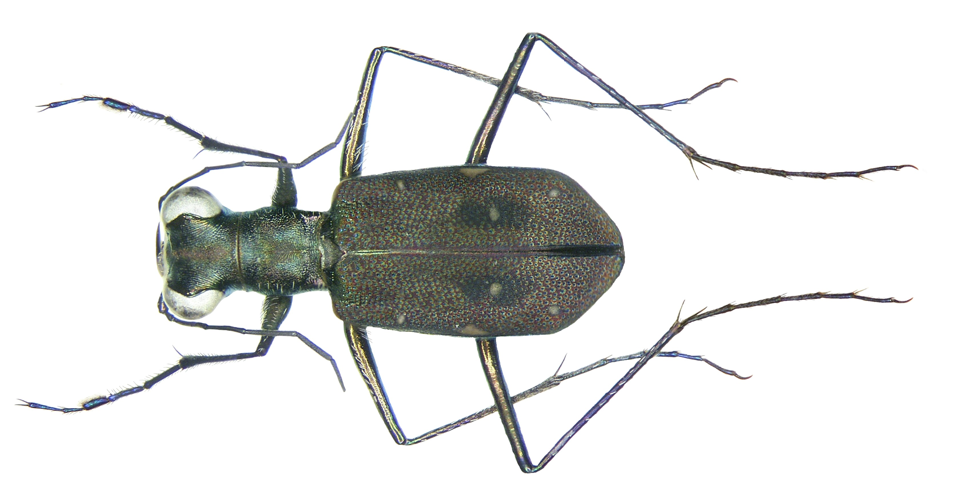 Familie: Carabidae Grösse: 8 mm Fundort: Indonesien, Sulawesi, Sawangan leg. A.Skale, 2006; det. J.Wiesner Foto: U.Schmidt, 2007